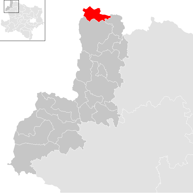 Bezirk Gmünd